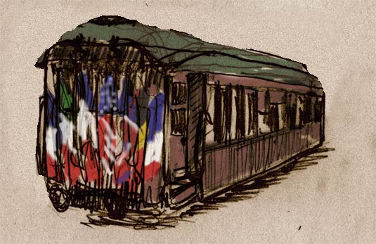 Wagon de l'armistice 2005